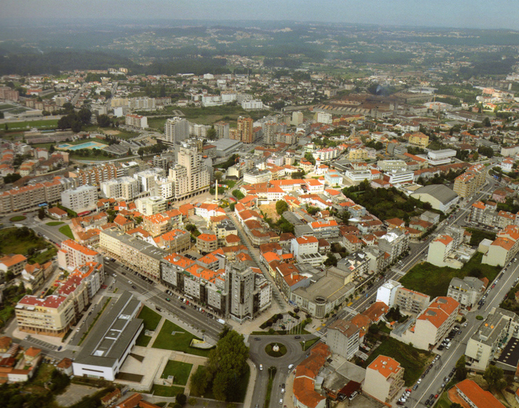 Vista aérea parcial do centro da cidade